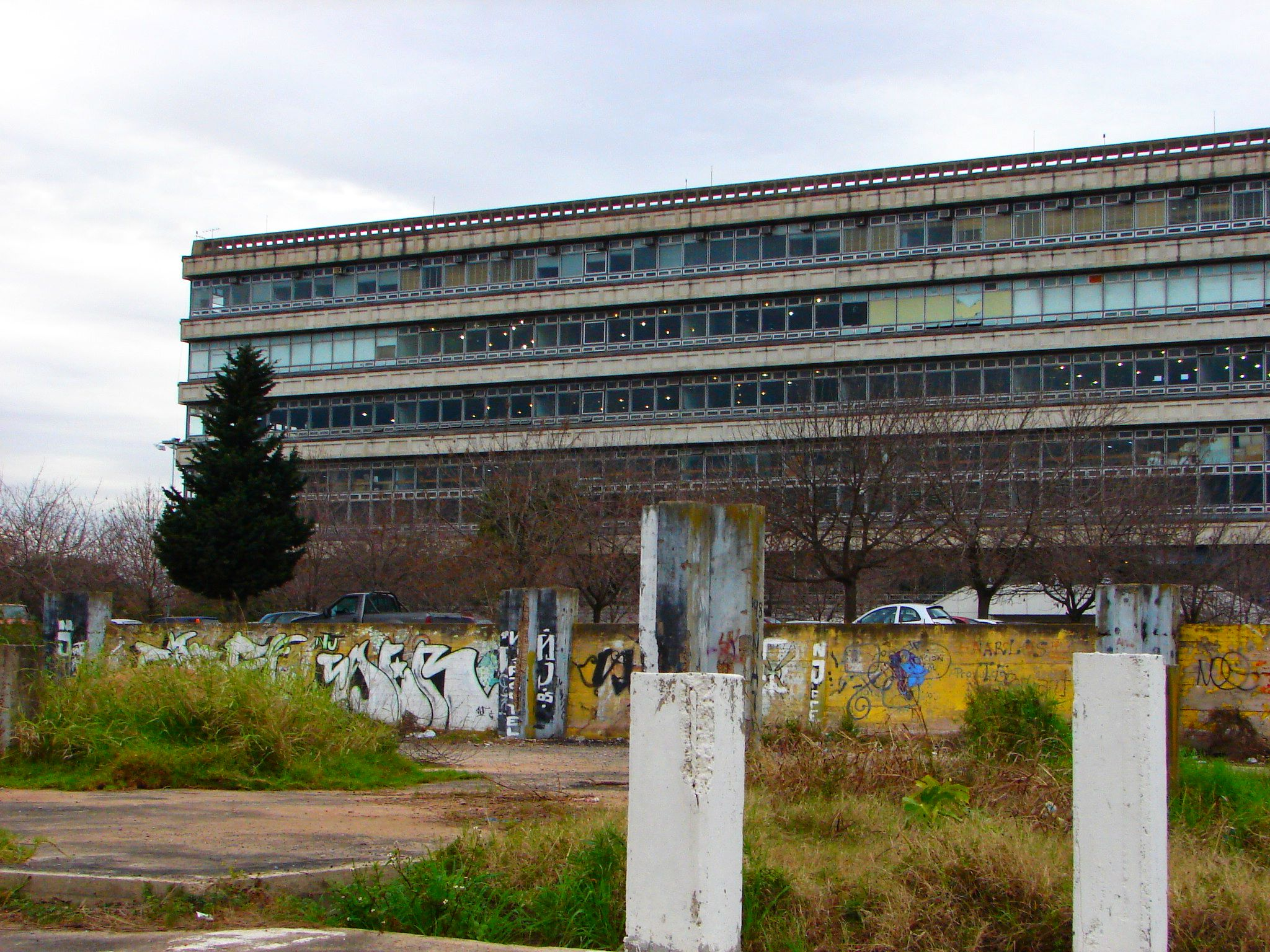 Fotografia del edificio de la Facultad de Arquitectura Diseño y Urbanismo (FADU) de la Universidad de Buenos Aires (UBA)en Argentina. Tomada en Julio del 2006 Trabajo propio, libero todos los derechos (dominio público)